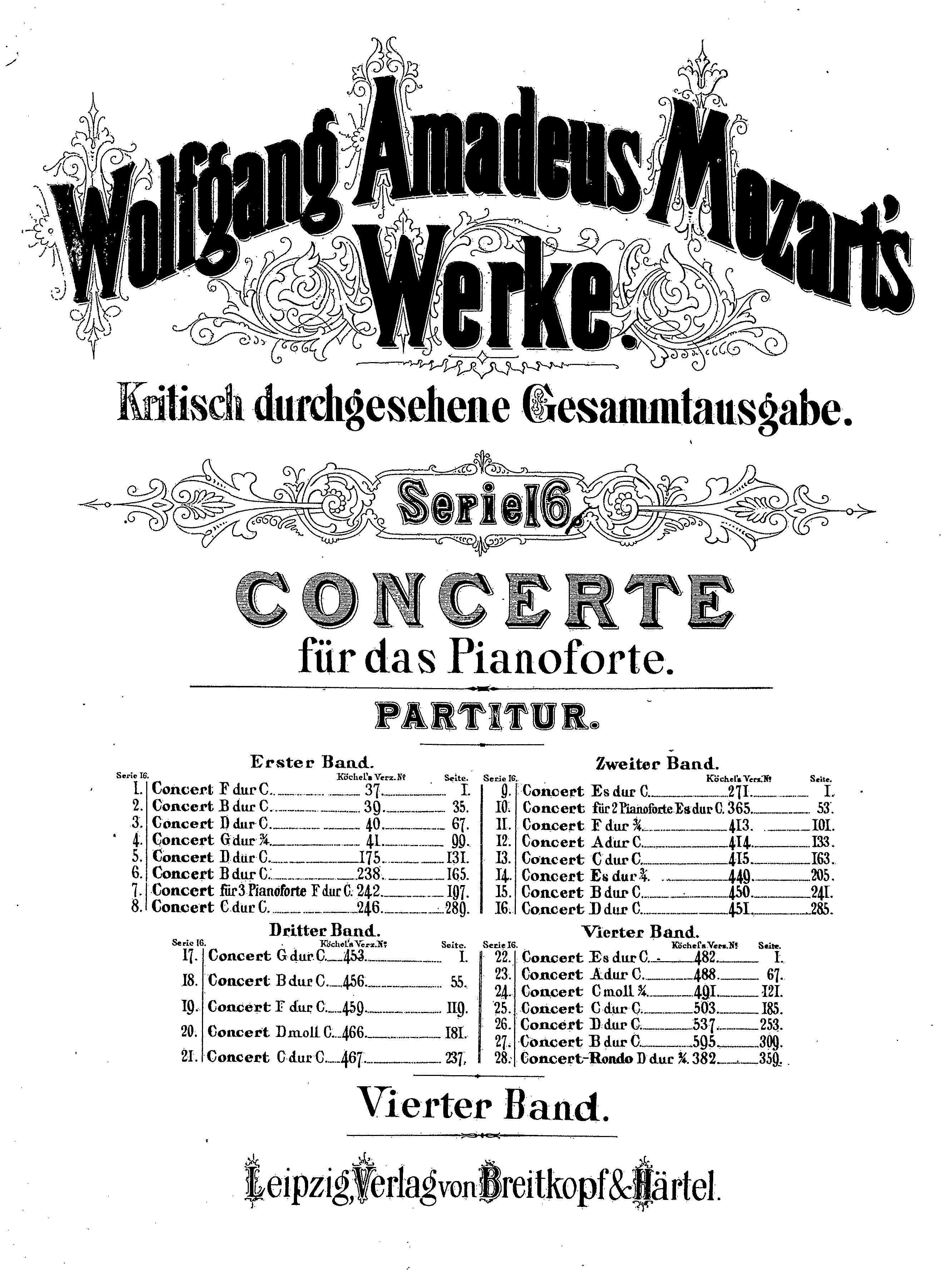 Edition de concertos de Mozart chez Breitkopf & Härtel